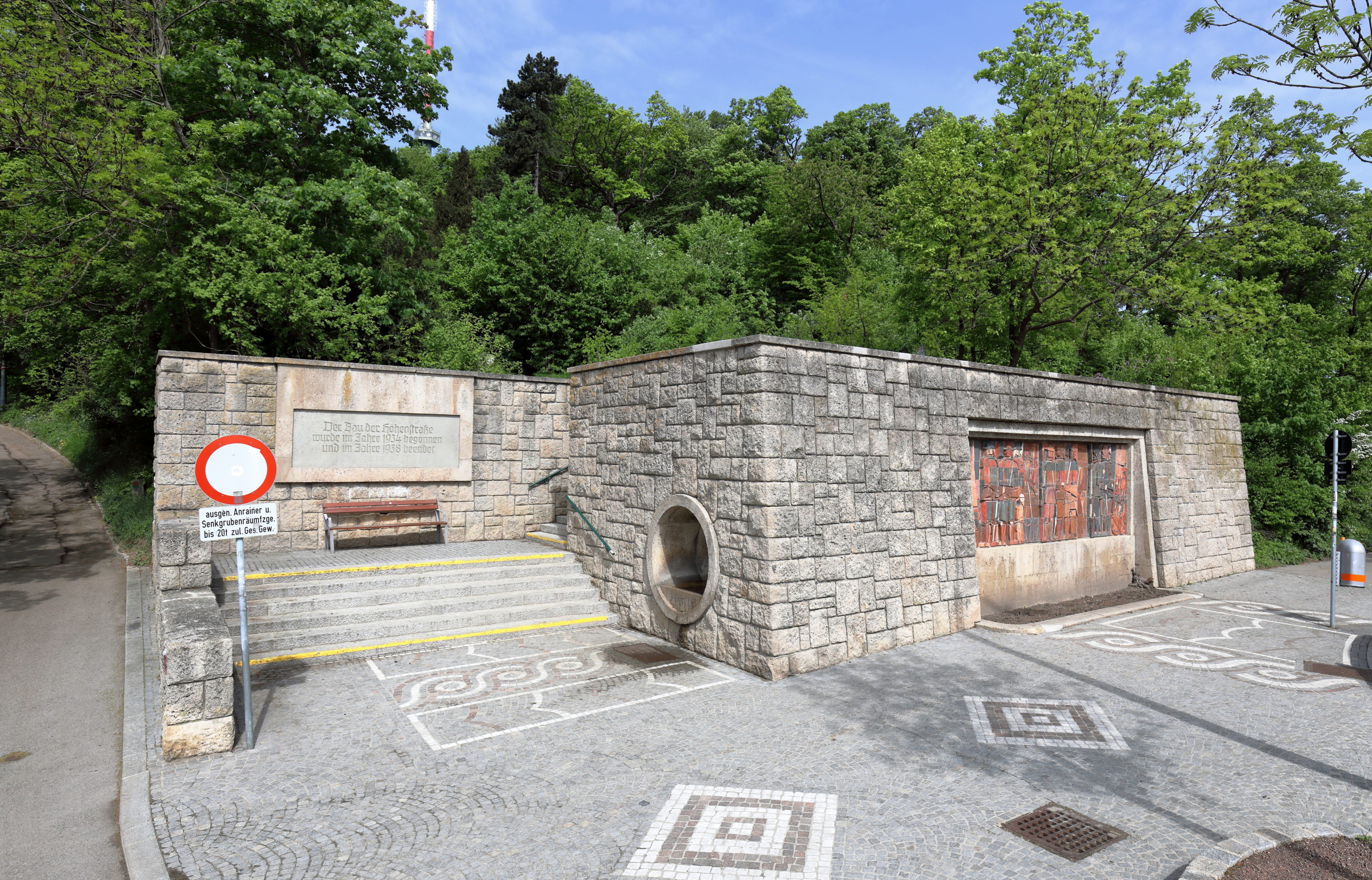 Die "Gedenkanlage" der Wiener Höhenstraße am Kahlenberg in Wien-Döbling.